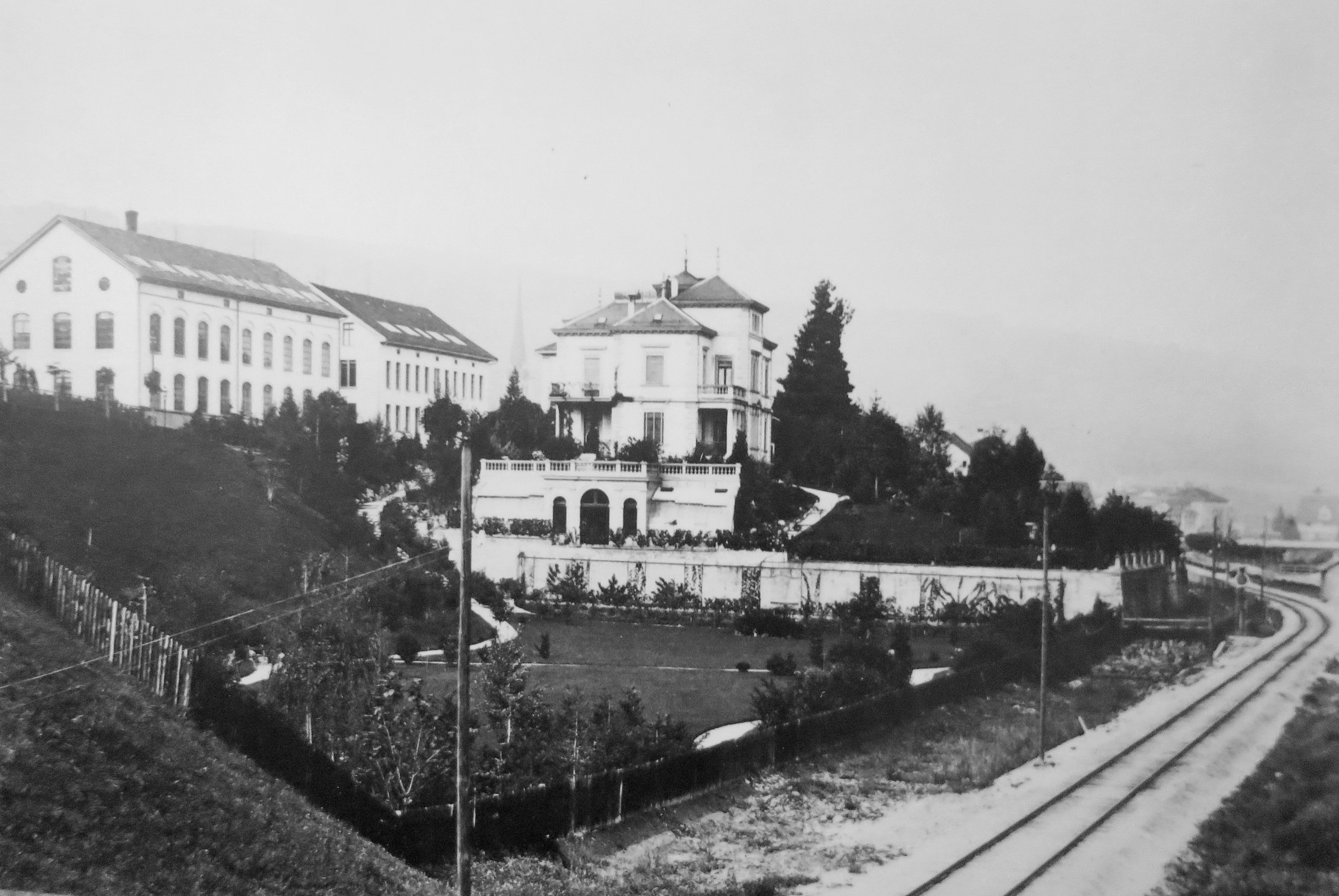 Fabrikgebäude, Villa und Park Stünzi Söhne, Horgen ZH, Schweiz: Historische Aufnahme von Südosten, kurz nach 1886. (Graphische Sammlung, Zentralbibliothek Zürich)